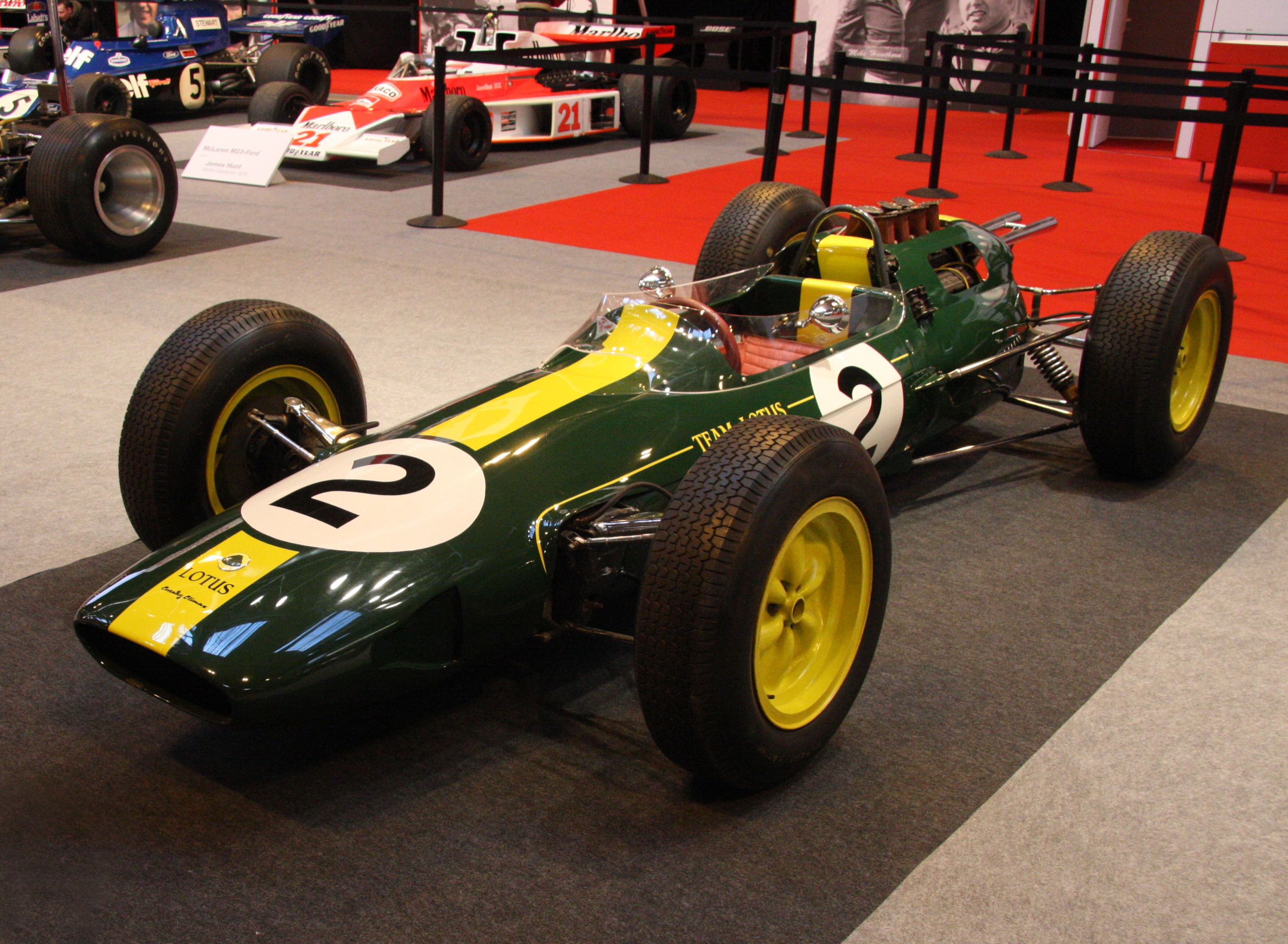 1962 Lotus 25 Climax